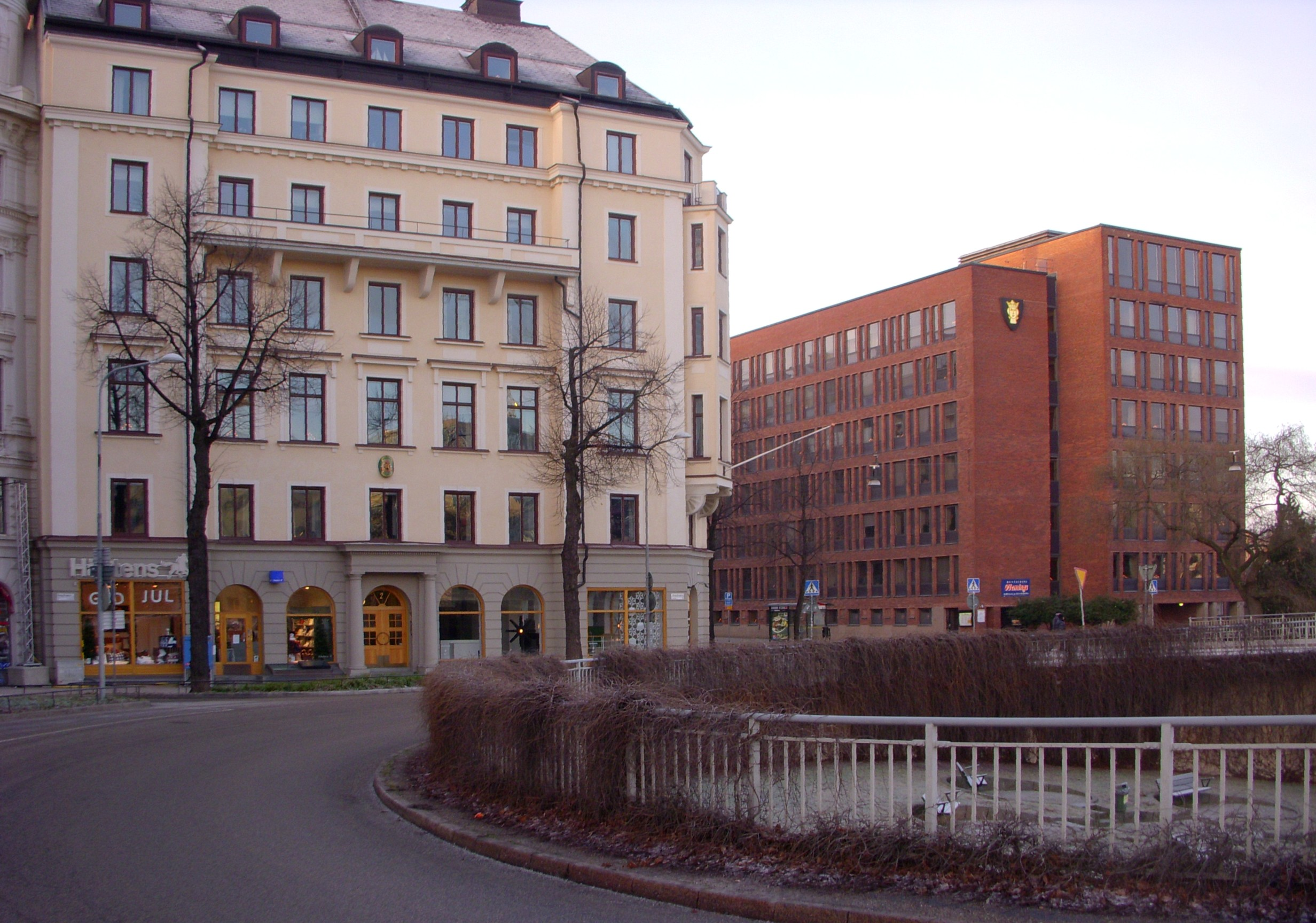 Kungsbroplan på Kungsholmen, Stockholm